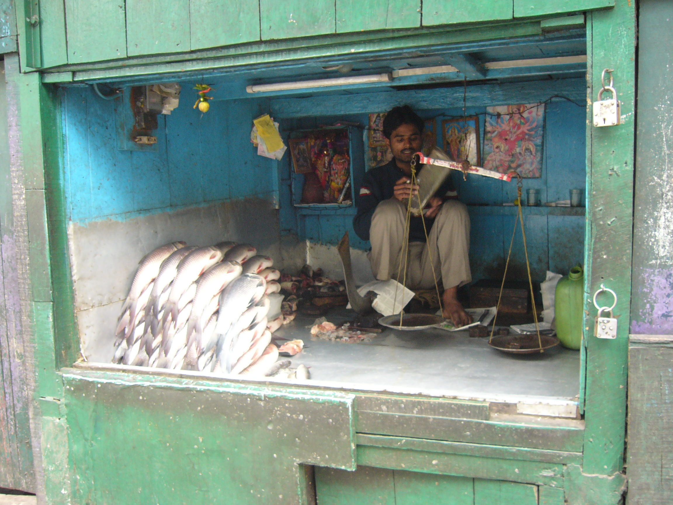 Darjeeling West Bengal India